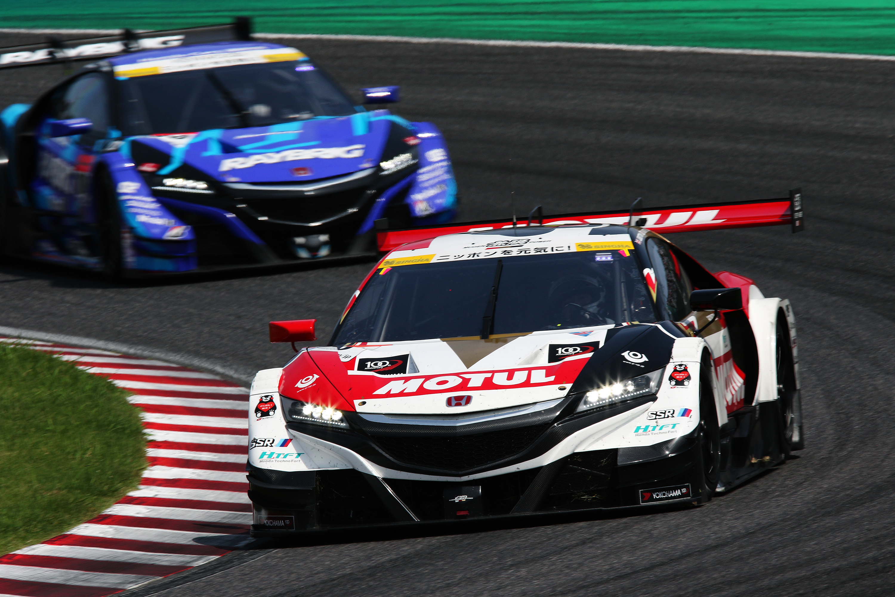 2017.8.27 SUPER GT Rd.6 Suzuka 1000km TEAM MUGEN 16 MOTUL MUGEN NSX-GT [7D2_0719ks]